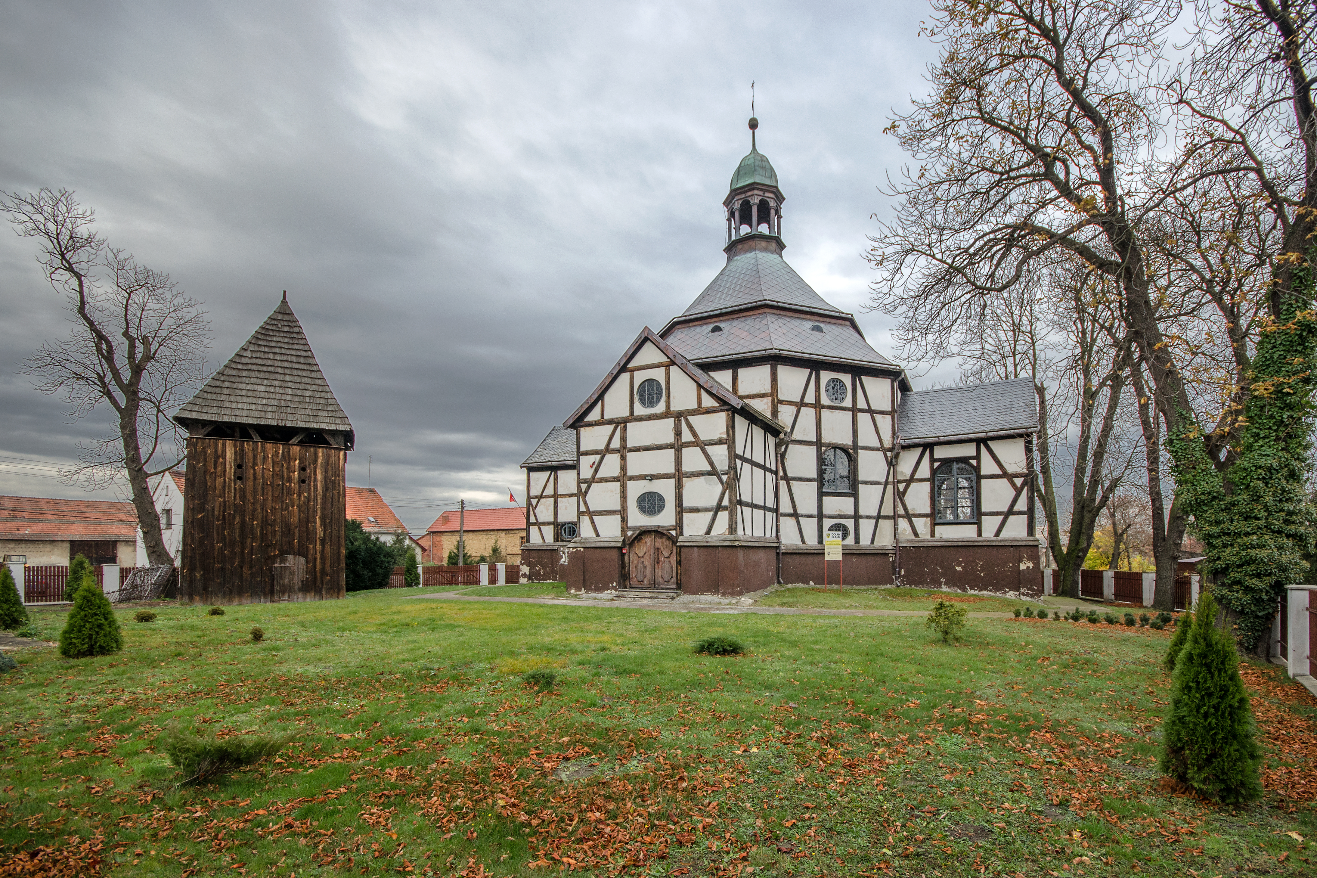 Pawłów Trzebnicki, kościół ewangelicki, ob. rzym.-kat., 1708-1709